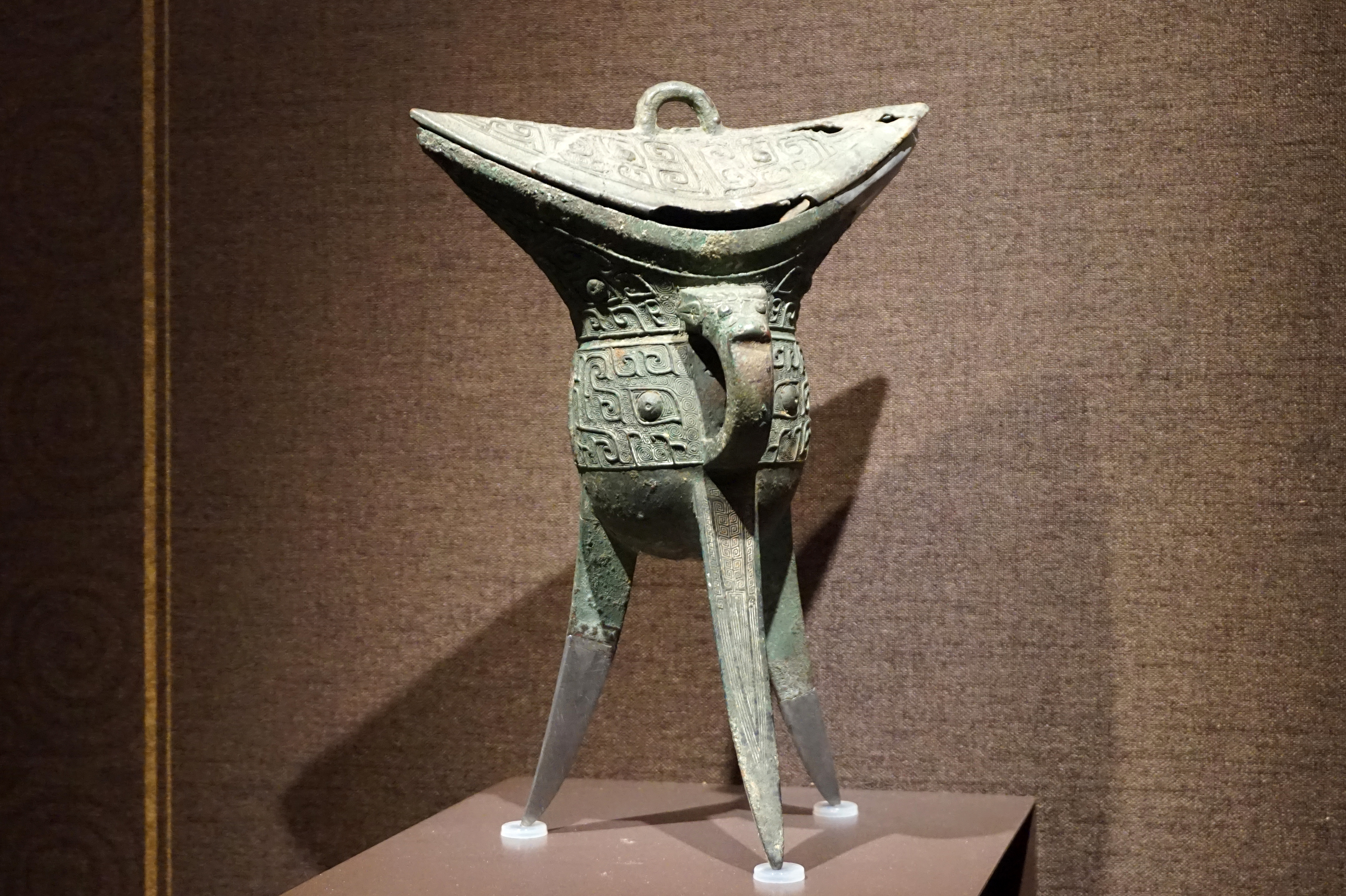 西周“父丁”有盖铜角，灵台百草坡出土。甘肃省博物馆藏。